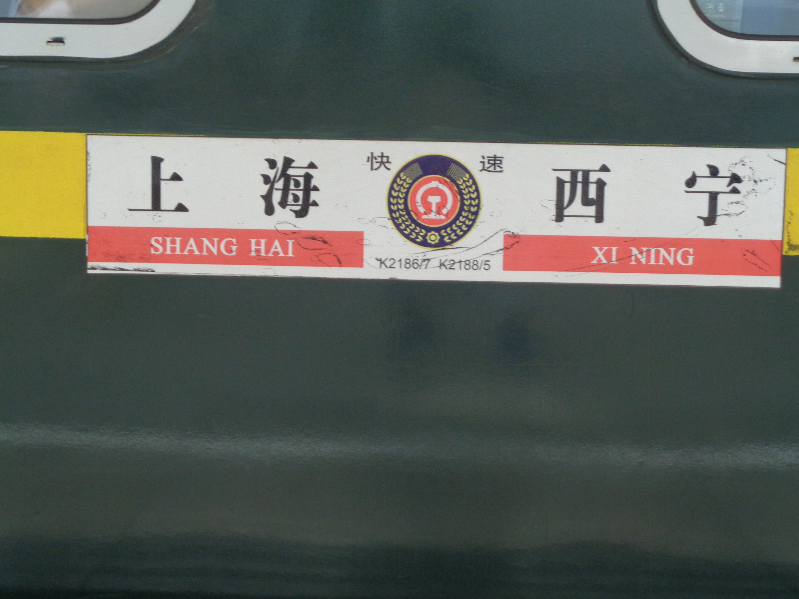 上海-西宁列车水牌